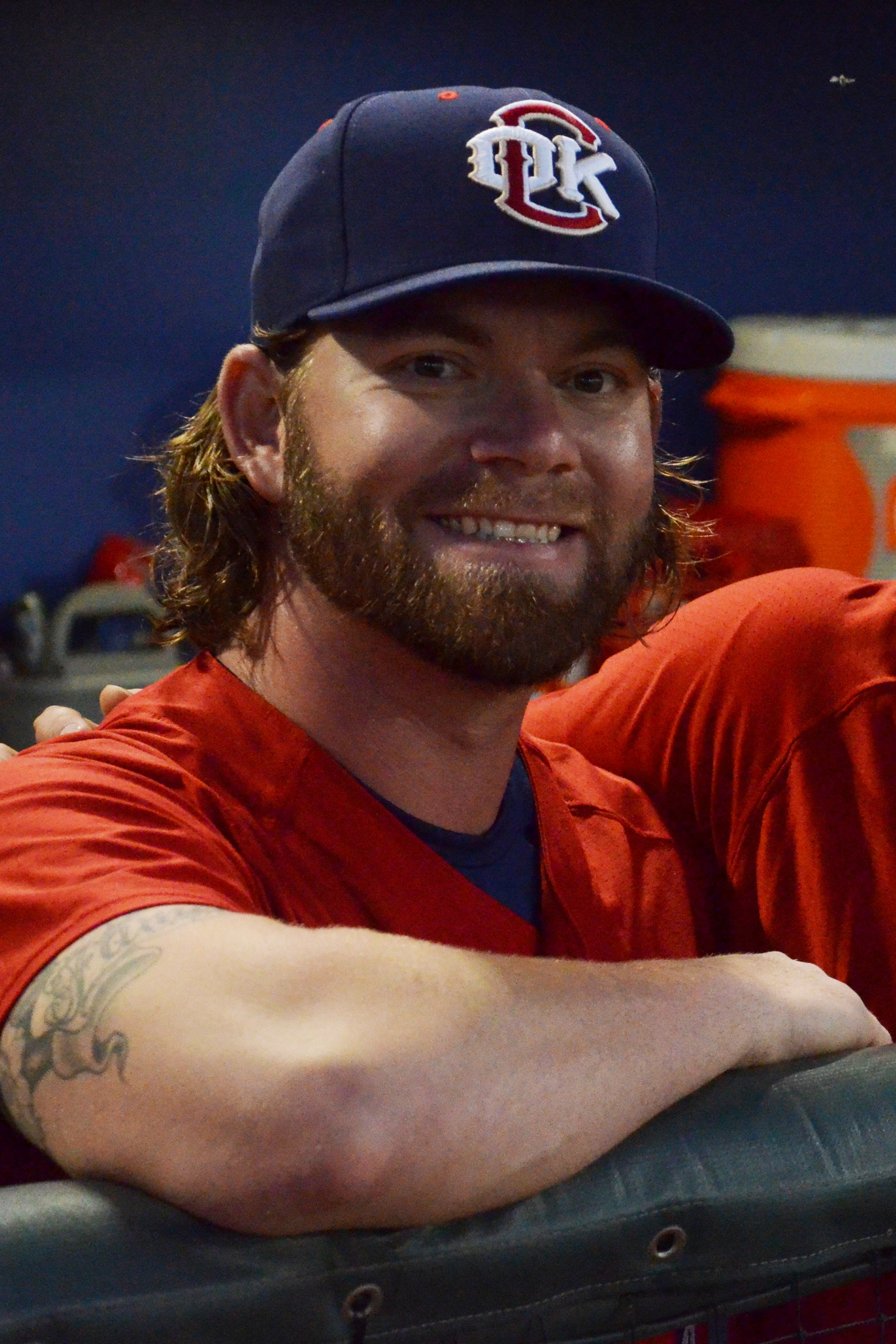 Rudy Owens